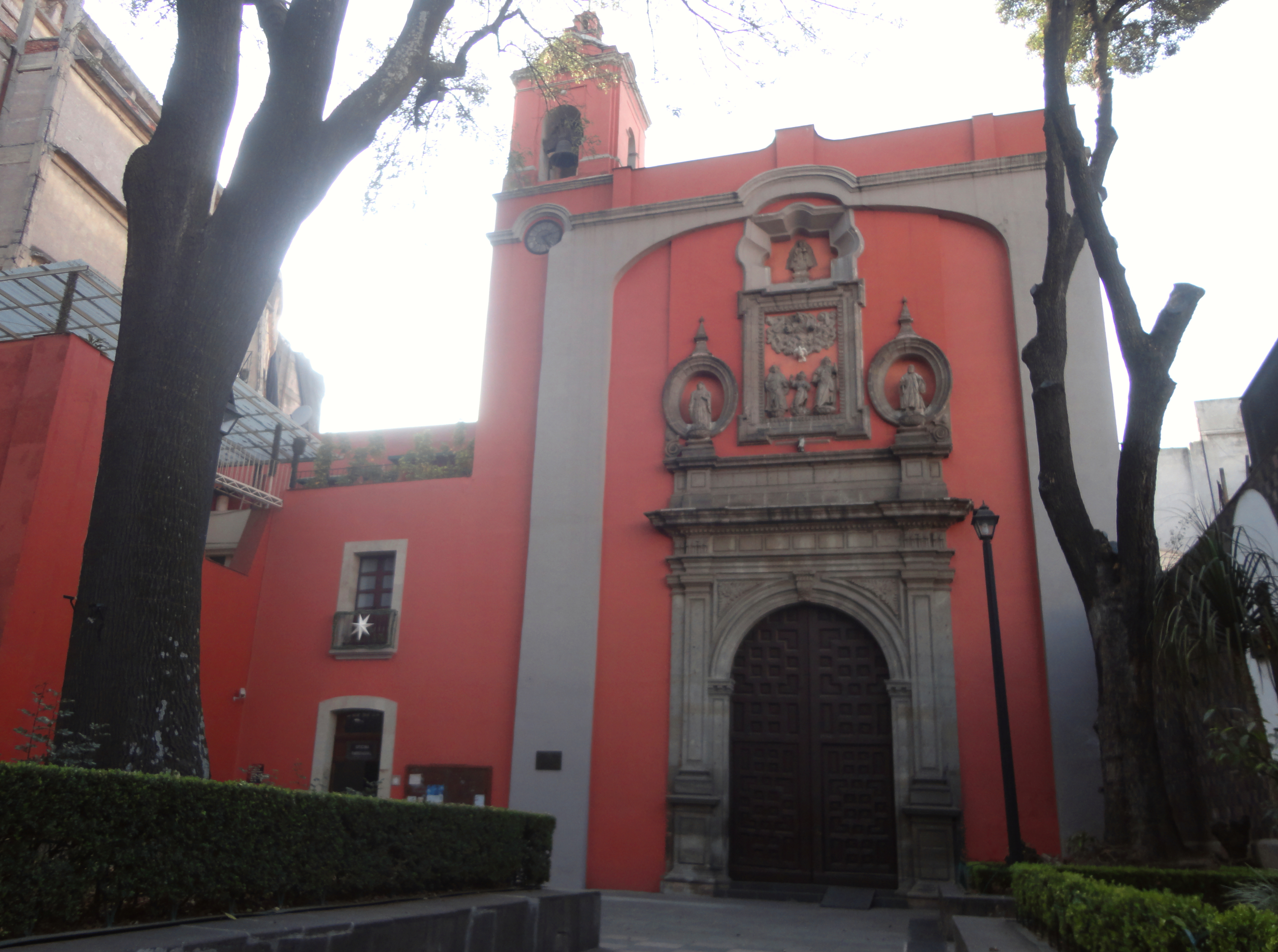 Parroquia de los santos Cosme y Damián - Colonia San Rafael, Ciudad de México, México.